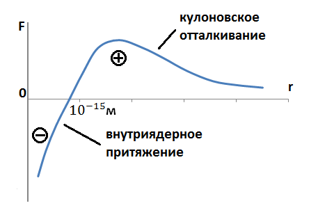 Сила взаимодействия двух протонов или двух легких ядер как функция расстояния между ними. Универсальный механизм взаимодействия в природе.